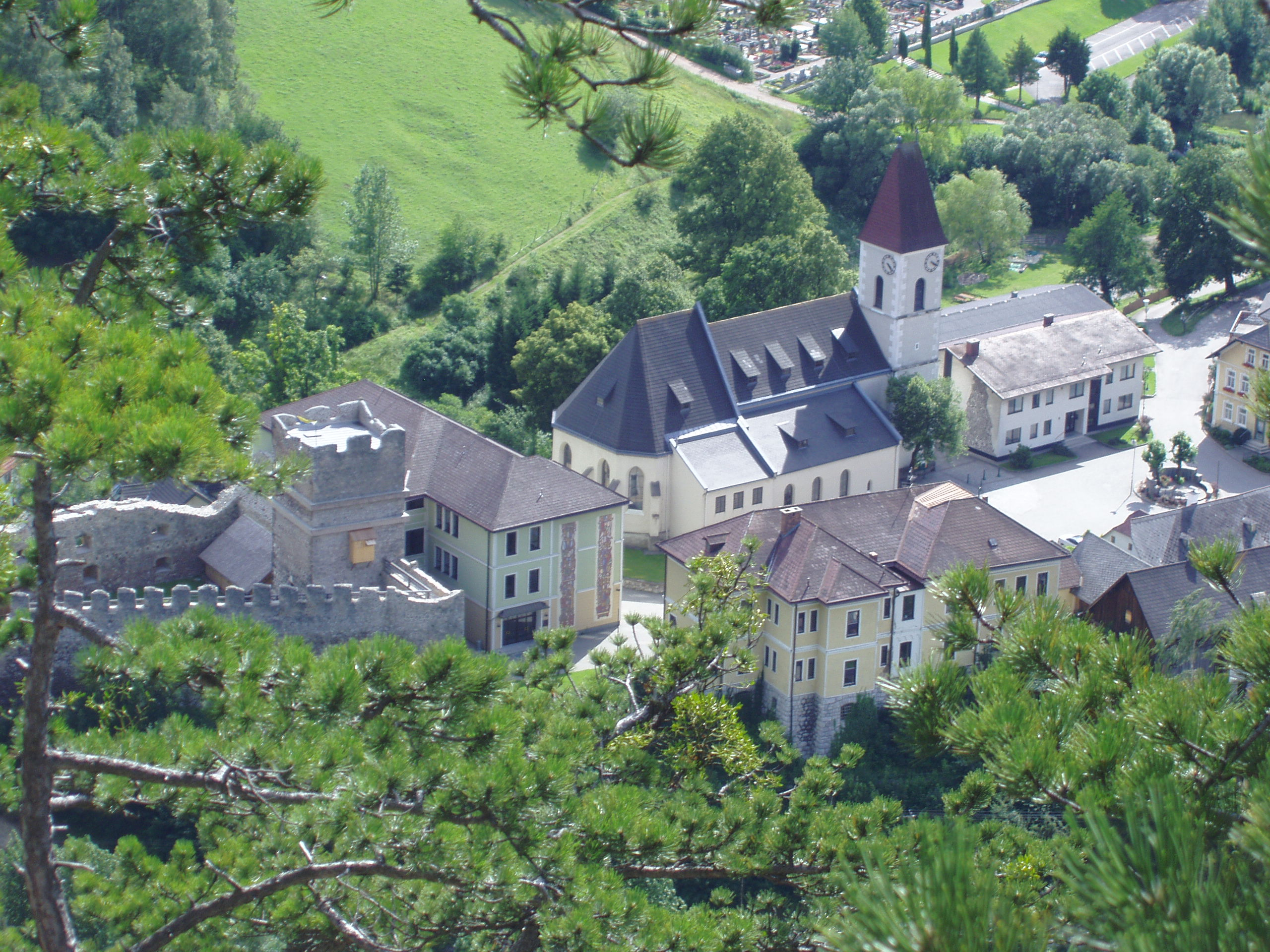 Der sogenannte "Burgberg" mit Schulen, Kirche und Ruine in Puchberg am Schneeberg